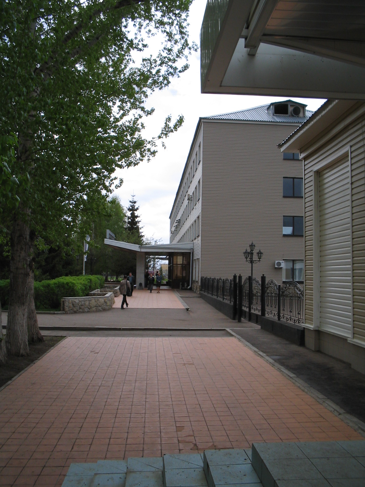 Бузулук. Здание "Оренбургнефтегаза".